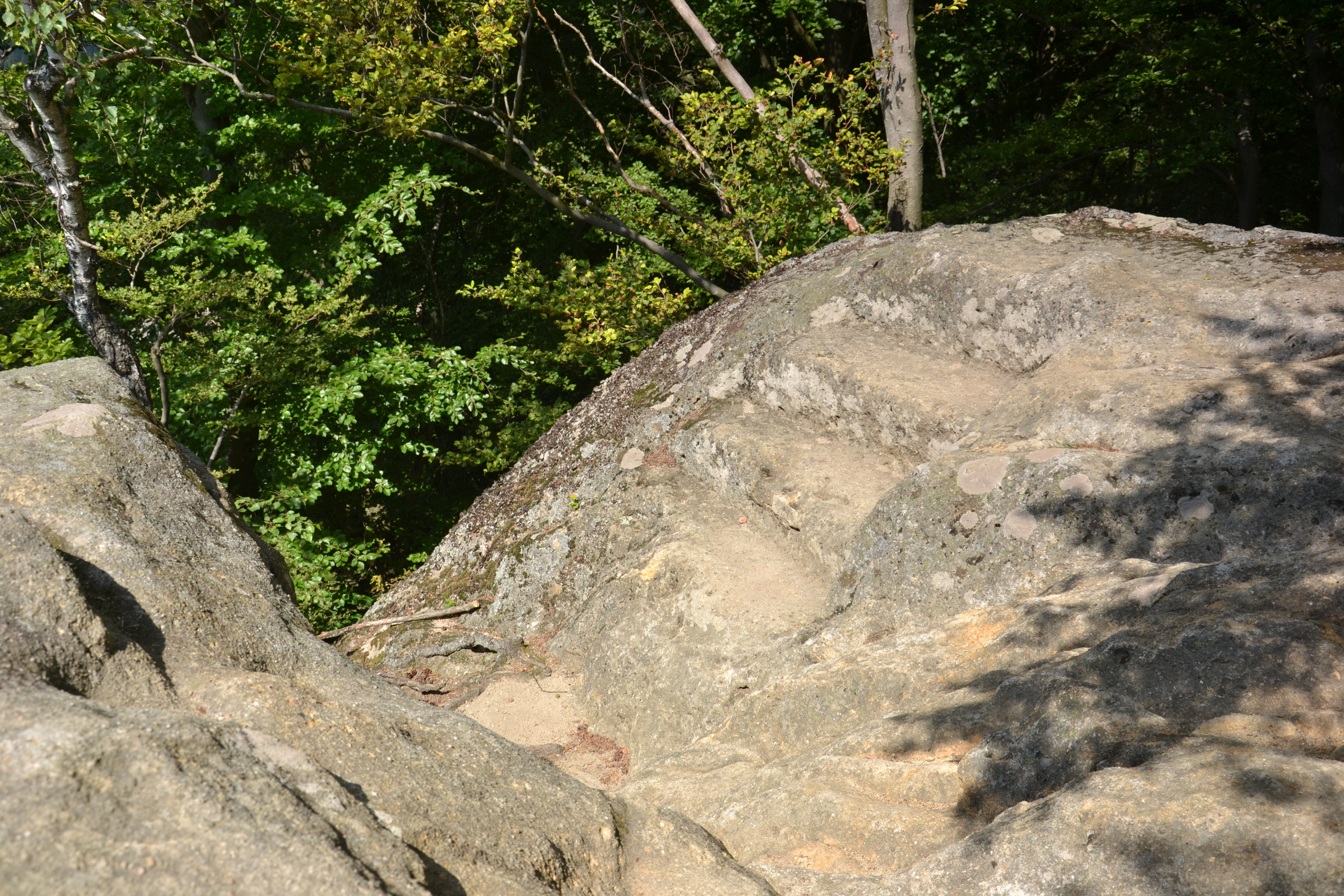 Hrad Pulčín – ve skále vytesané schodiště na nejvyšším skalním bloku